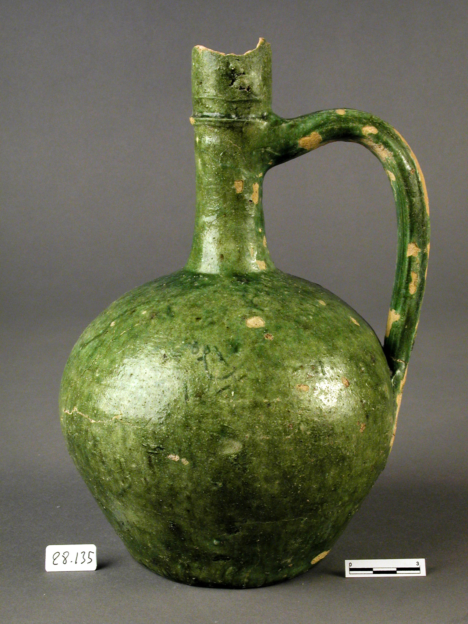 Museo de Almeria